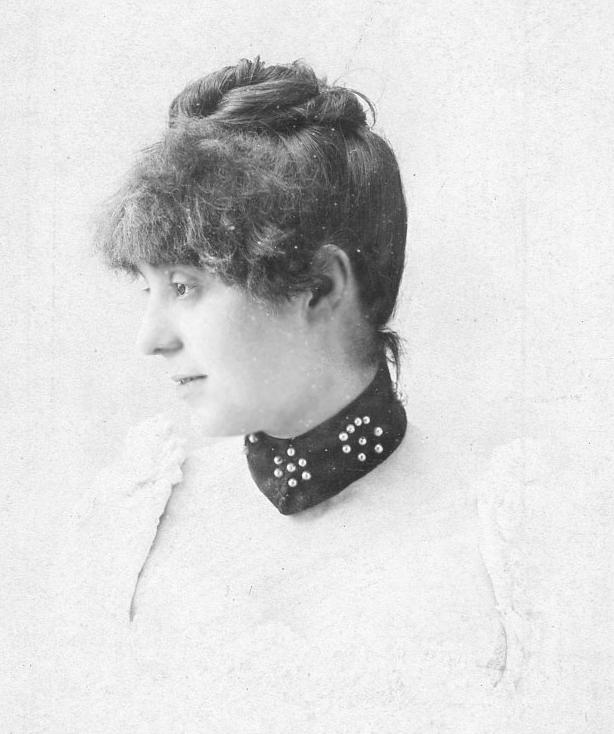 Gabriela Zapolska